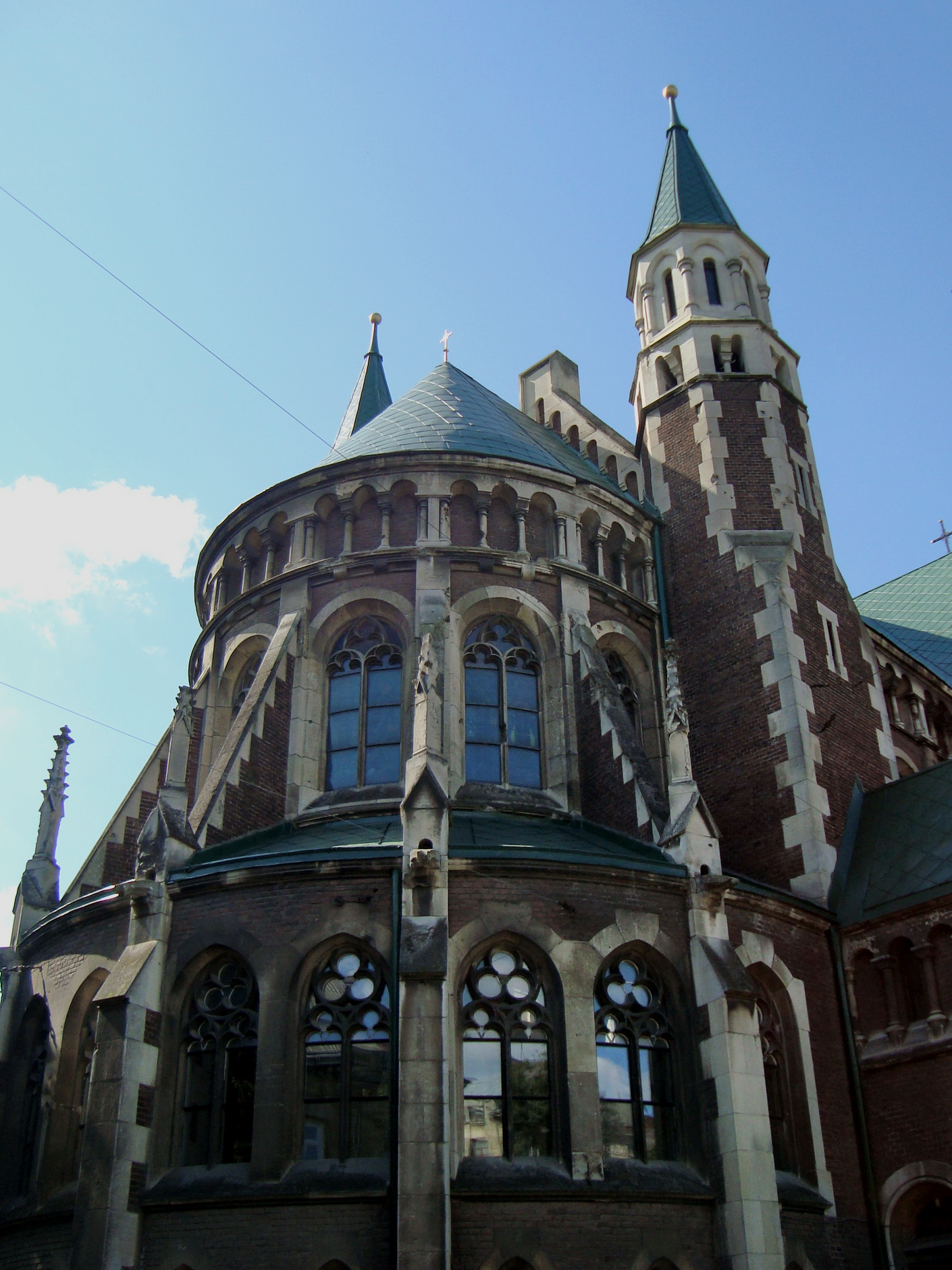 церква св. Ольги і Єлизавети, Львів, Кропивницького пл., 1